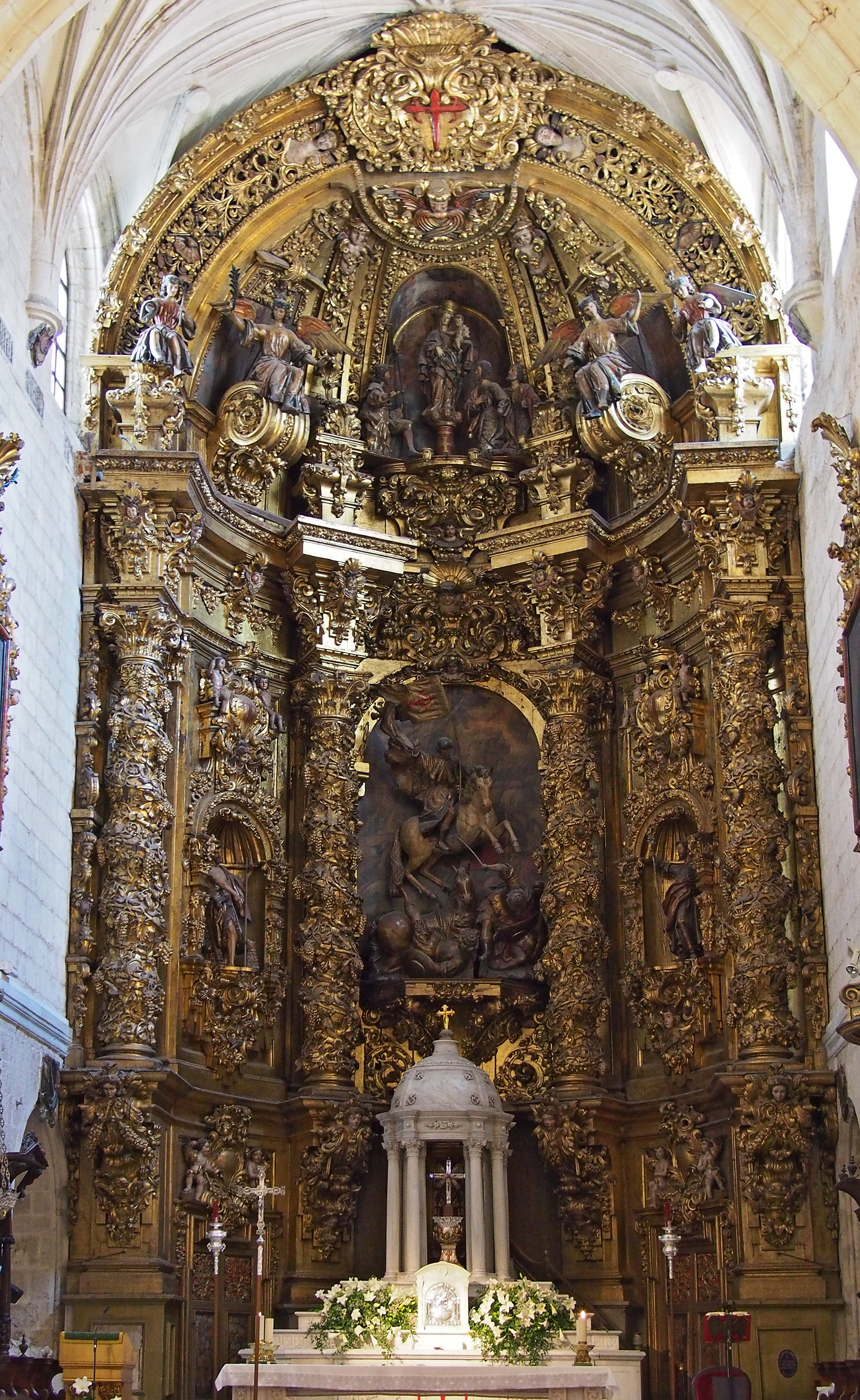 Retablo mayor (1698) de la Iglesia de Santiago Apóstol, Valladolid.